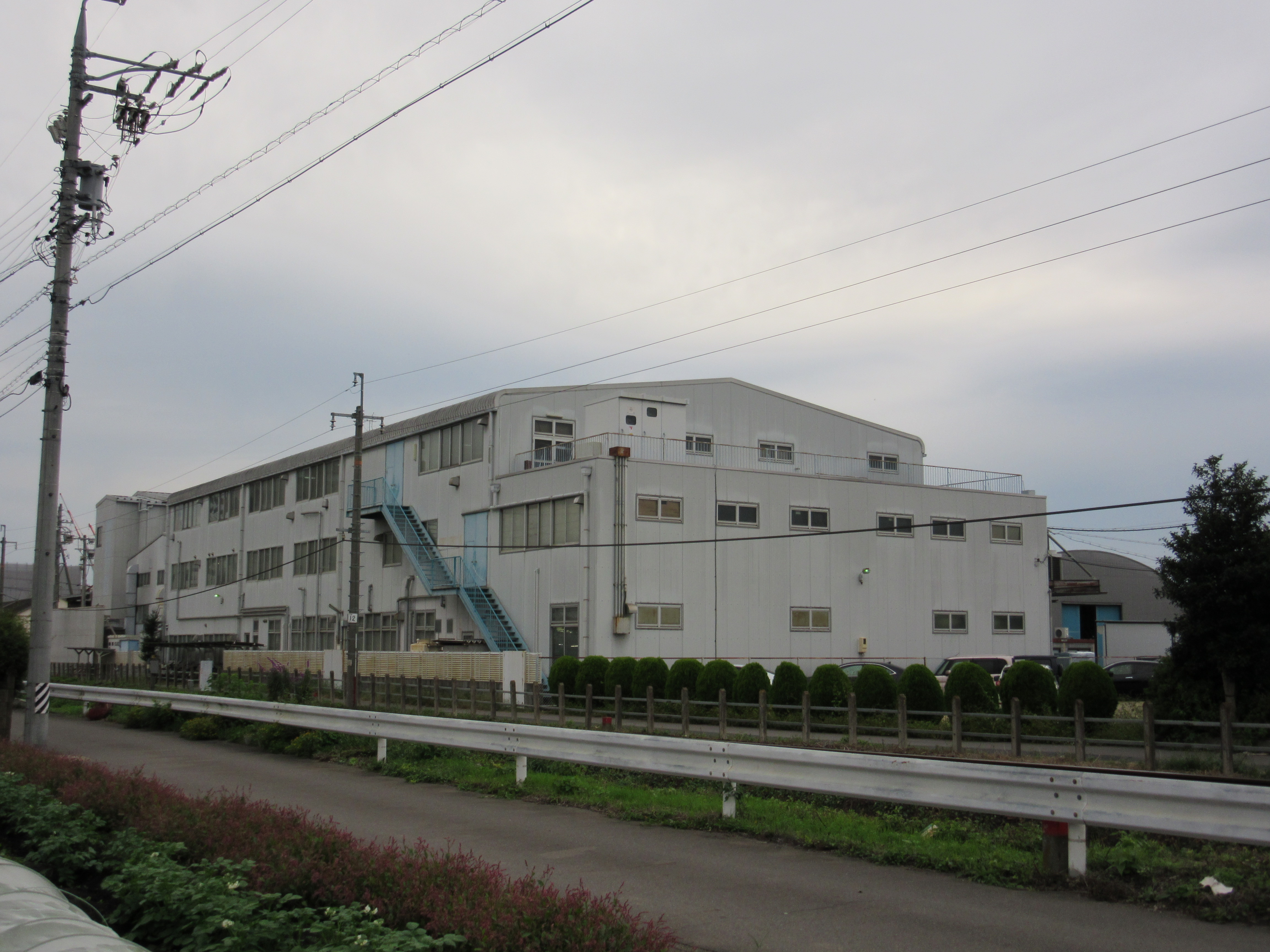 ムトー精工第三工場